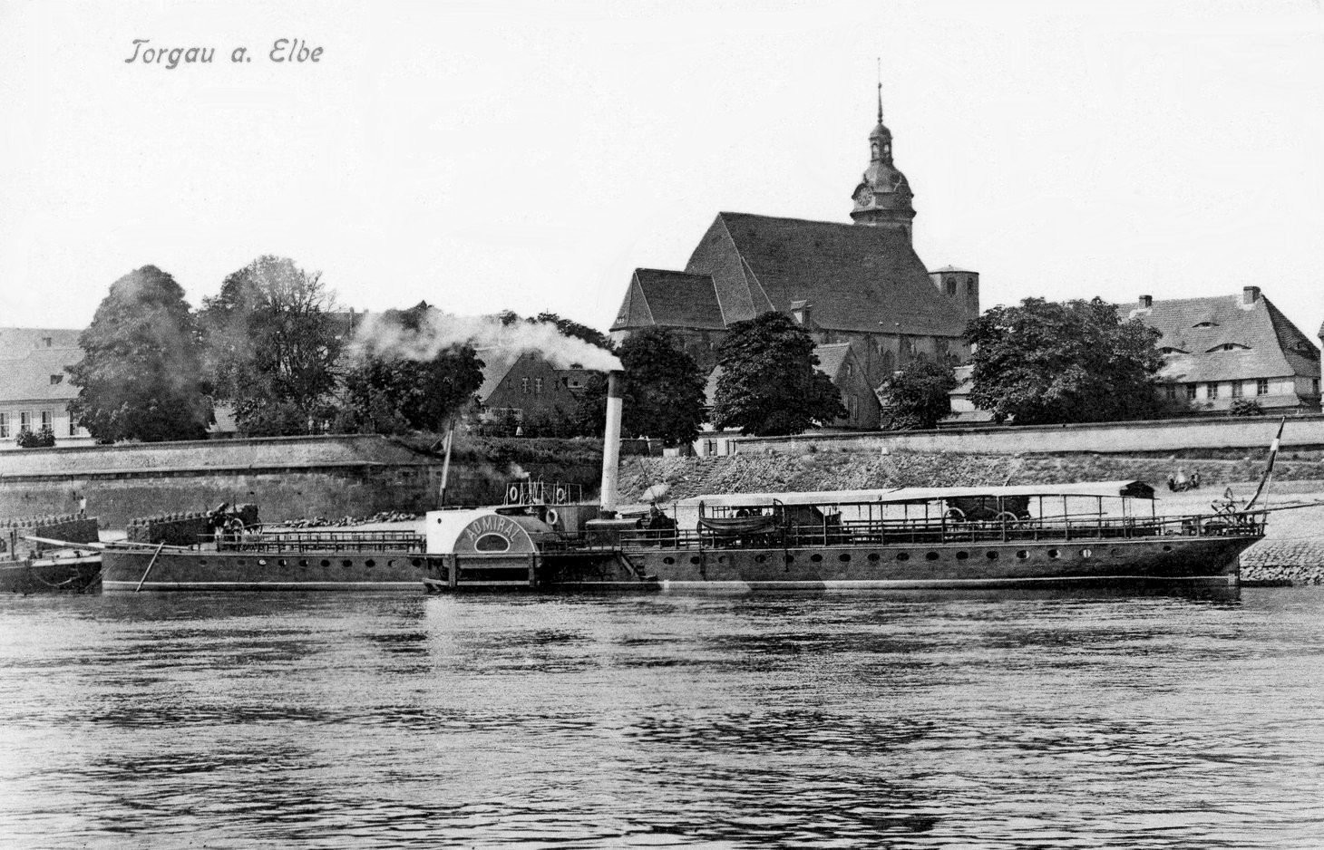 Torgau; Elbseite - mit Dampfer Admiral This postcard is from publisher Brück & Sohn in Meißen ( postcard has a unique number 10096 and is available in a higher resolution at the publisher. This images was uploaded in a cooperation project between Wikipedians and the publisher.